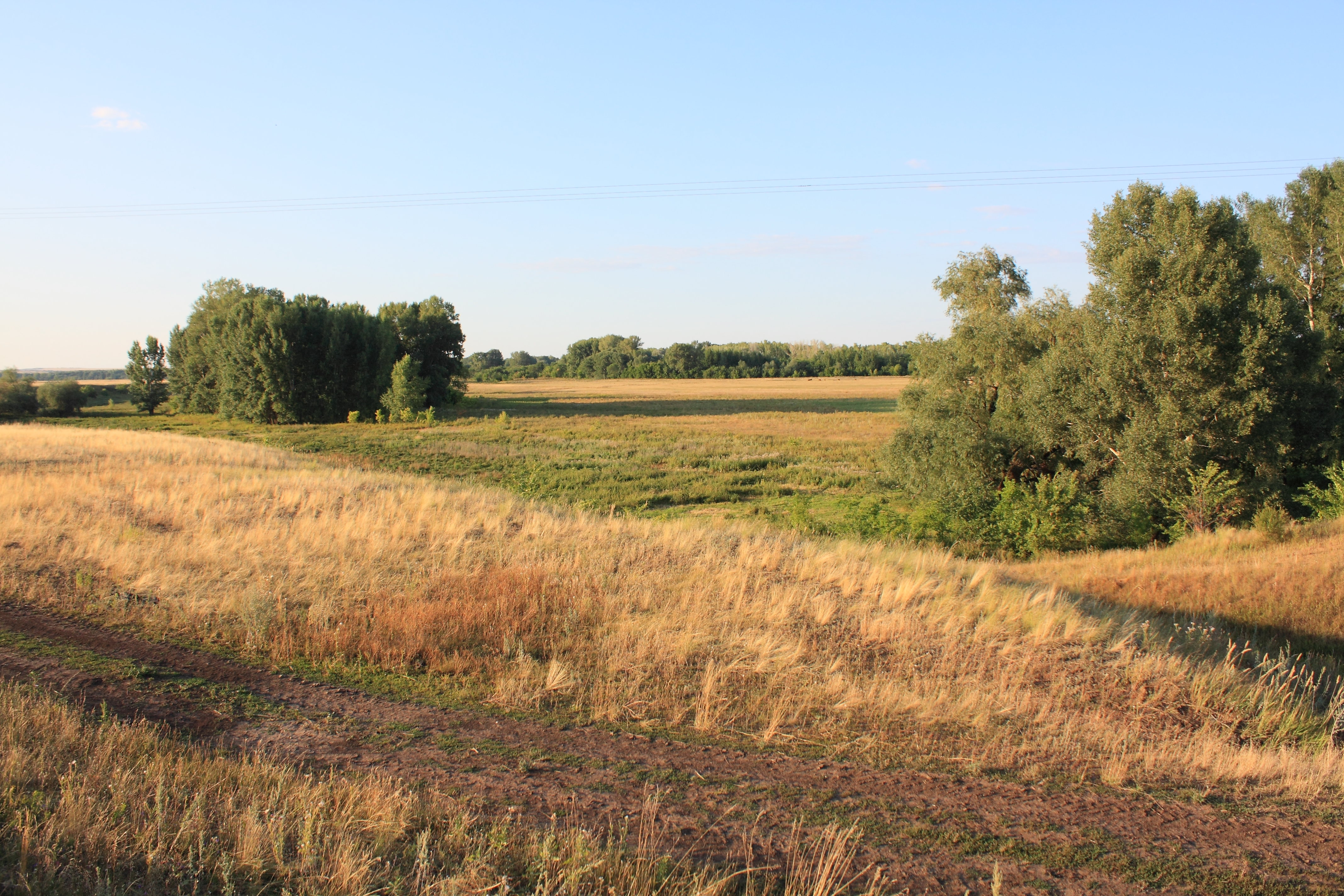 Перелески